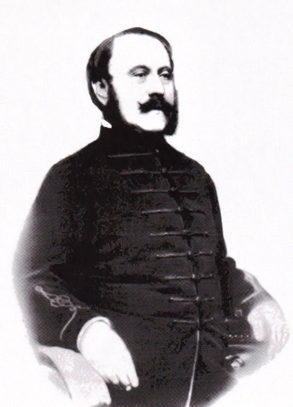 Báró Kemény Zsigmond (1814–1875) író